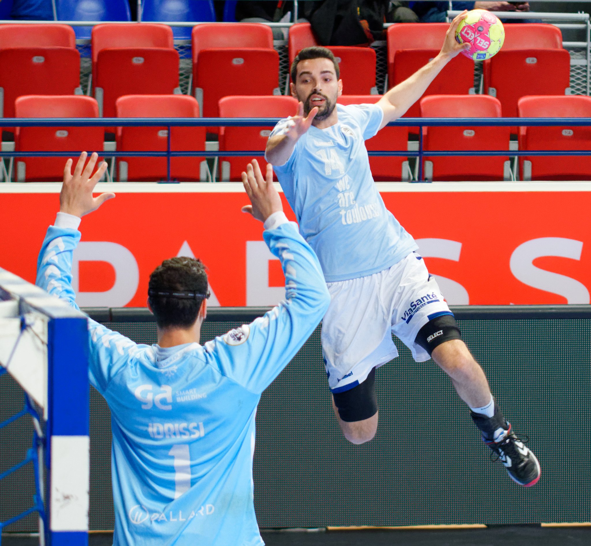 Rencontre de championnat de LidlStarLigue entre le PSG et Toulouse. A Coubertin, le 29 mars 2017.